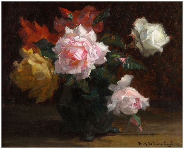 Hendricus Dievenbach Rosen